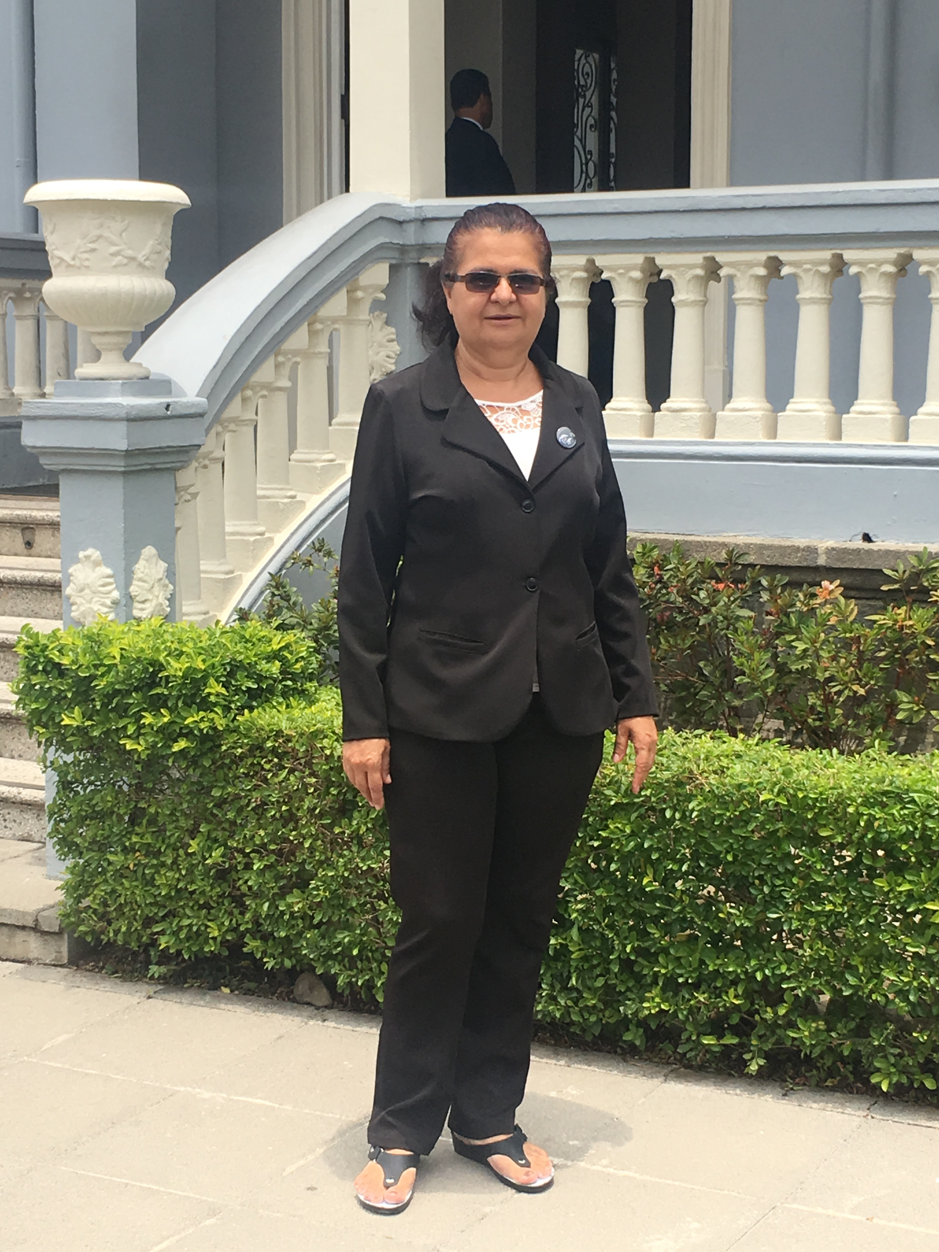 Diputada Ligia Fallas en la Asamblea Legislativa de la República de Costa Rica